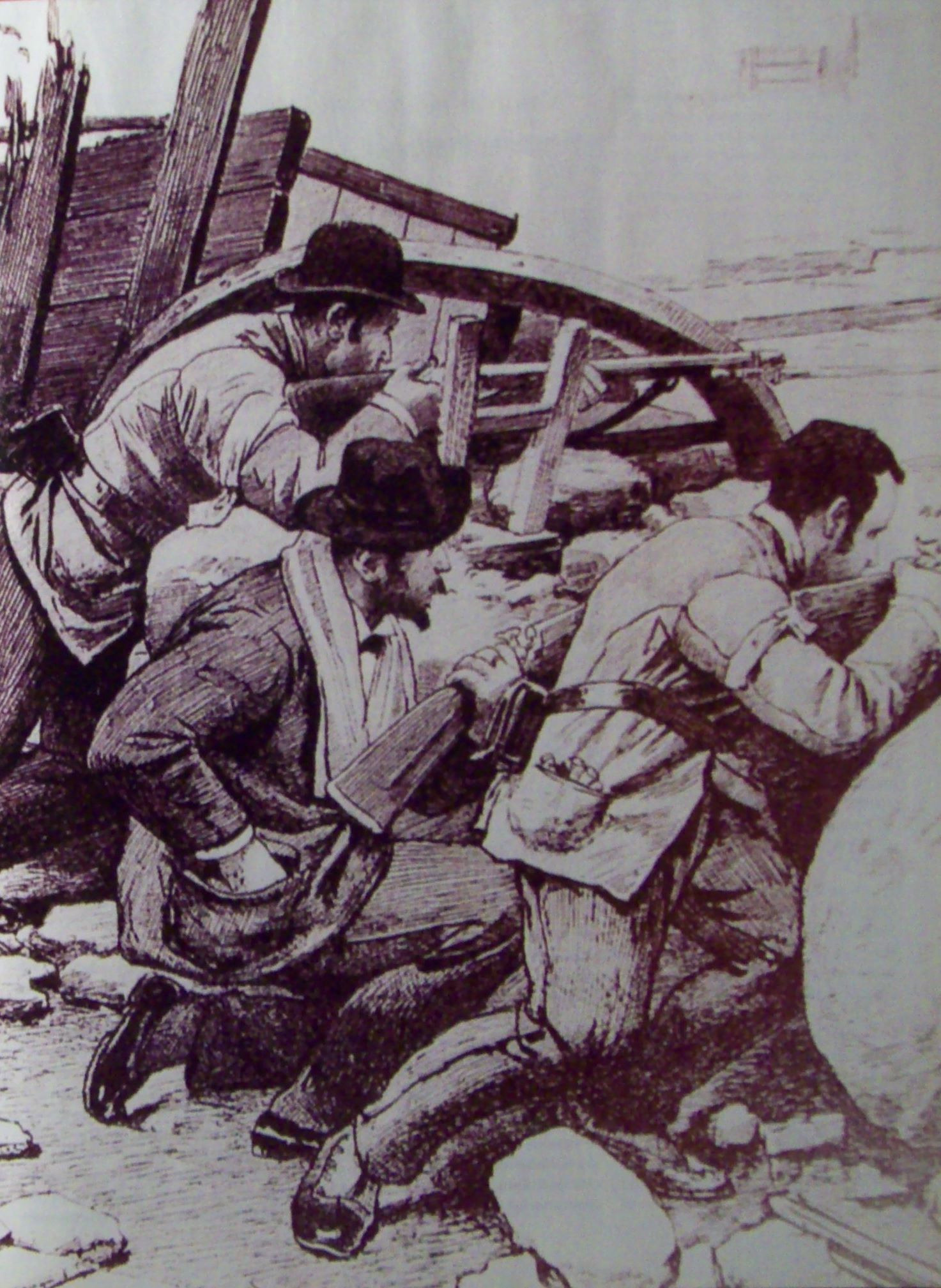 Escena de la Revolución del Parque, dibujo.